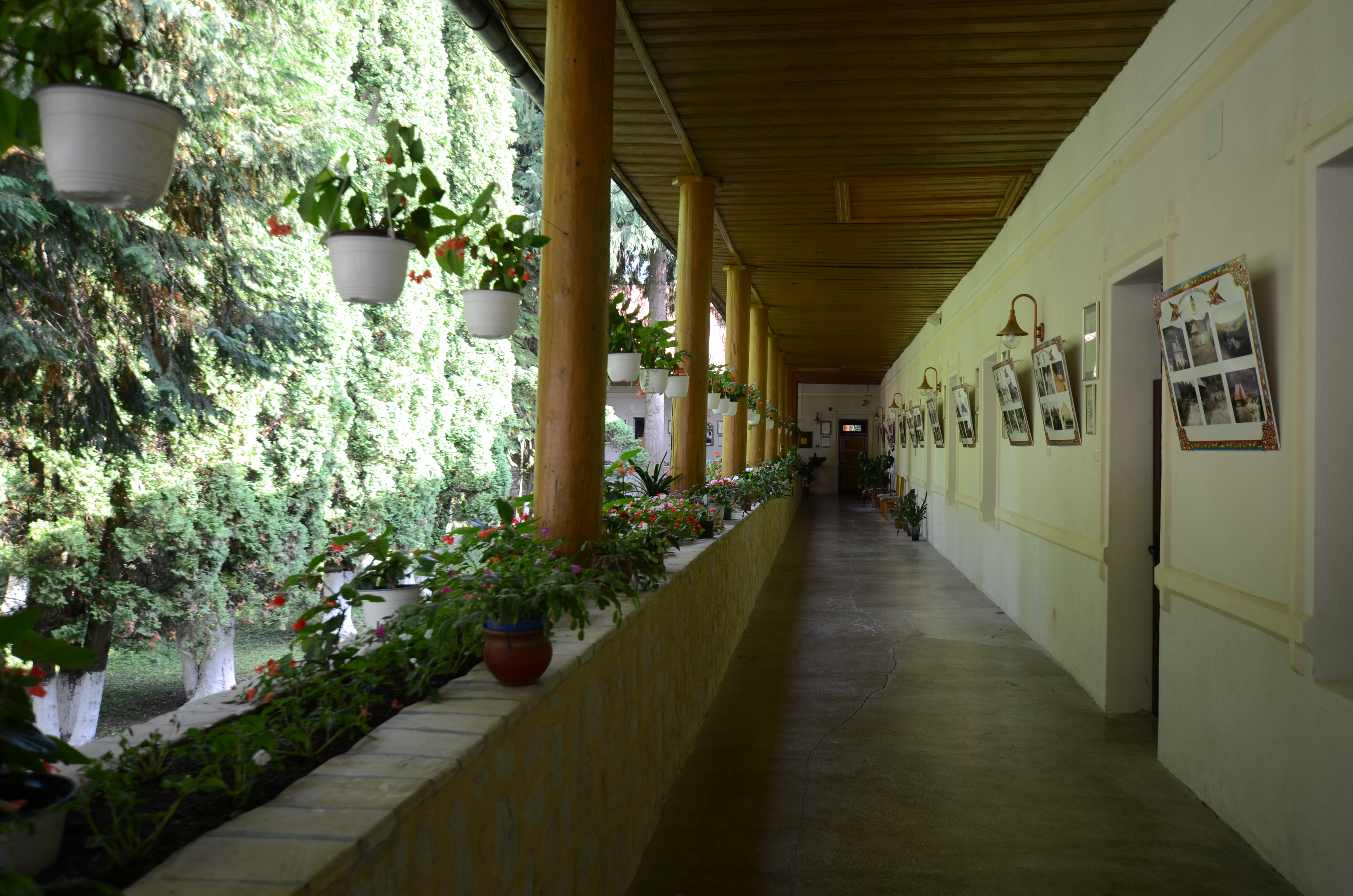 Mănăstirea Pângărați, Neamț - chilii 02